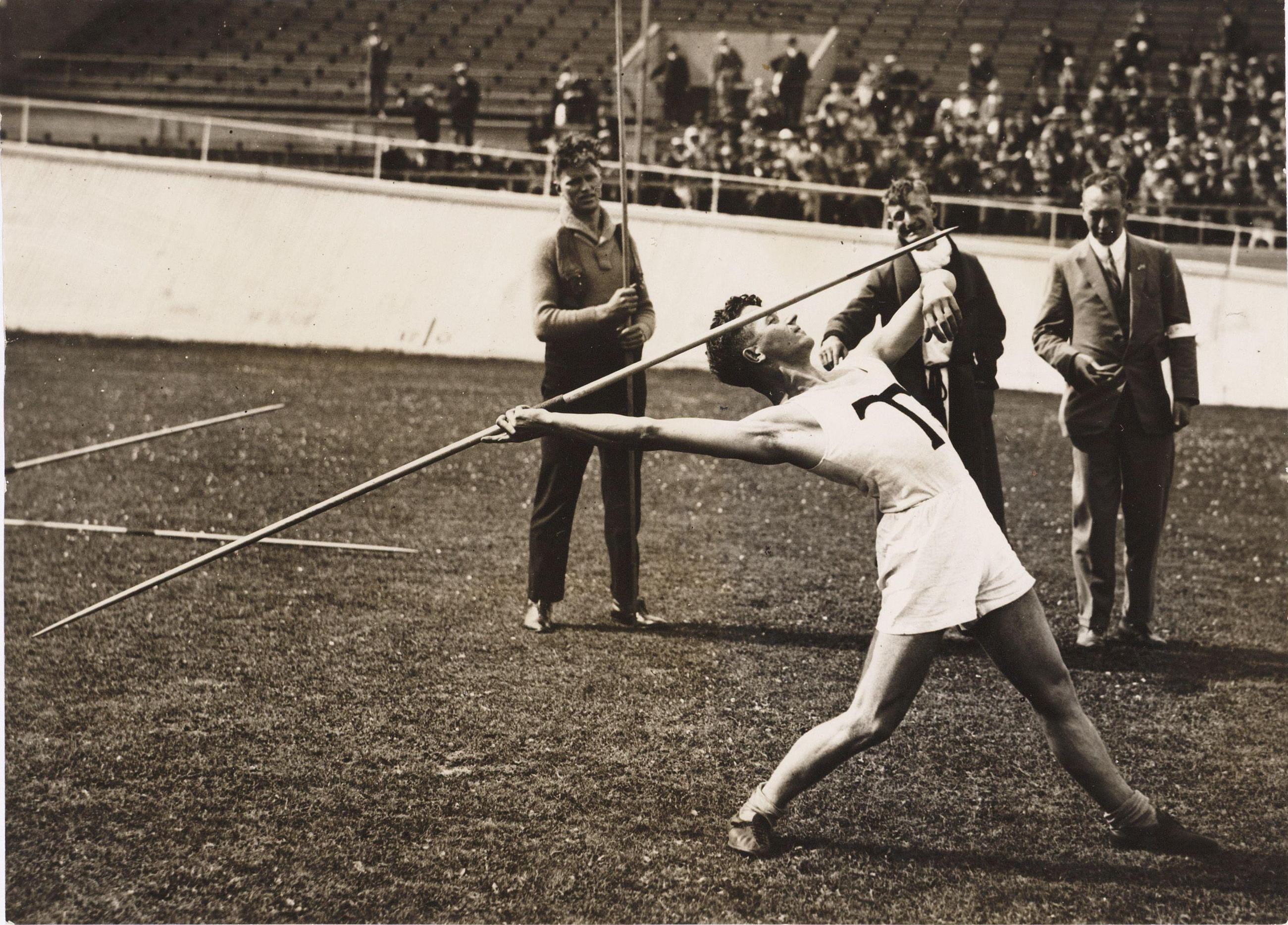 Jaap Knol was een Nederlandse atleet.